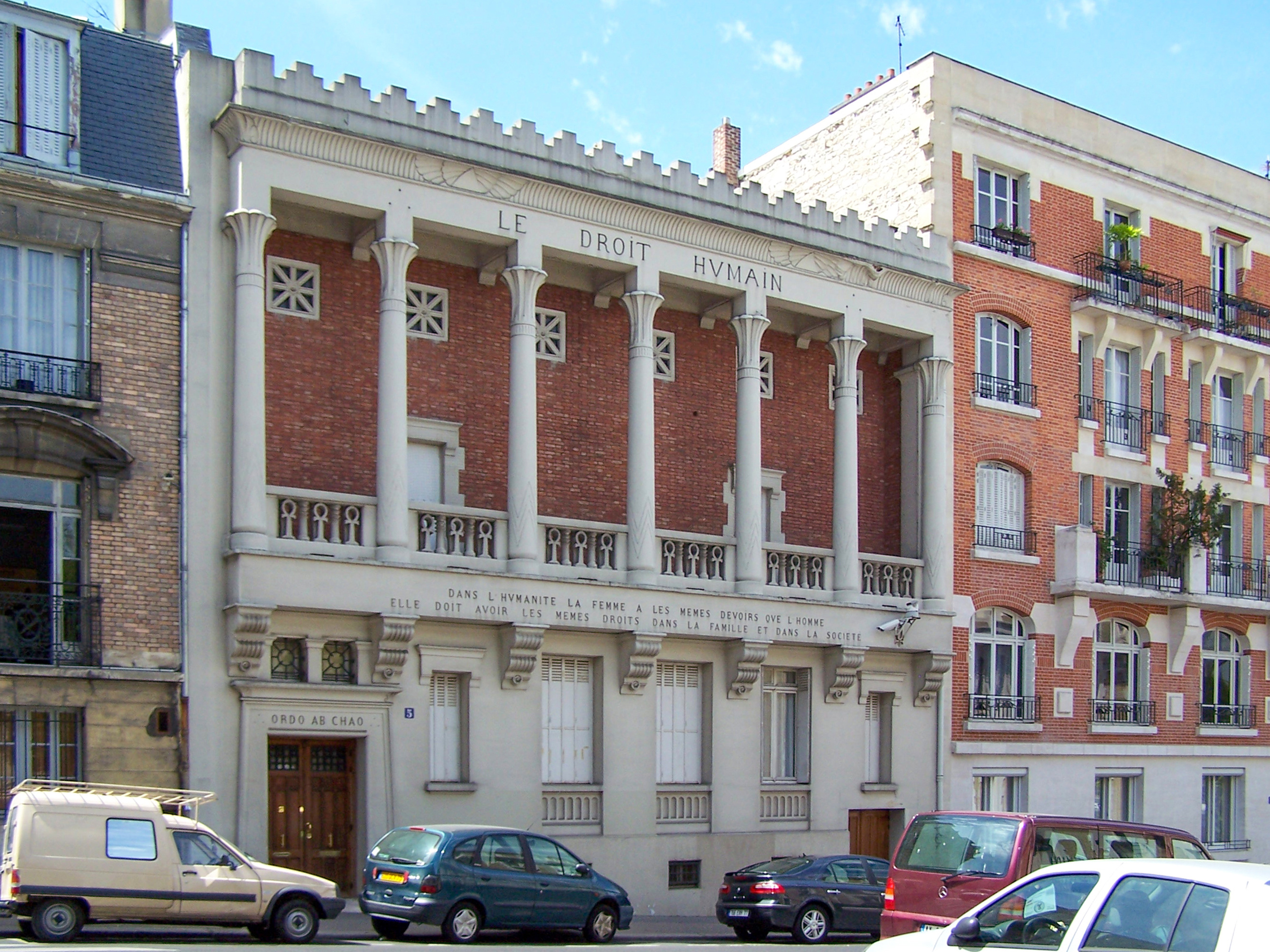 Vue de la loge maçonnique Le Droit humain rue Jules-Breton à Paris.